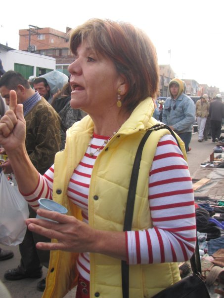 Gloria Cuartas en el Cartuchito